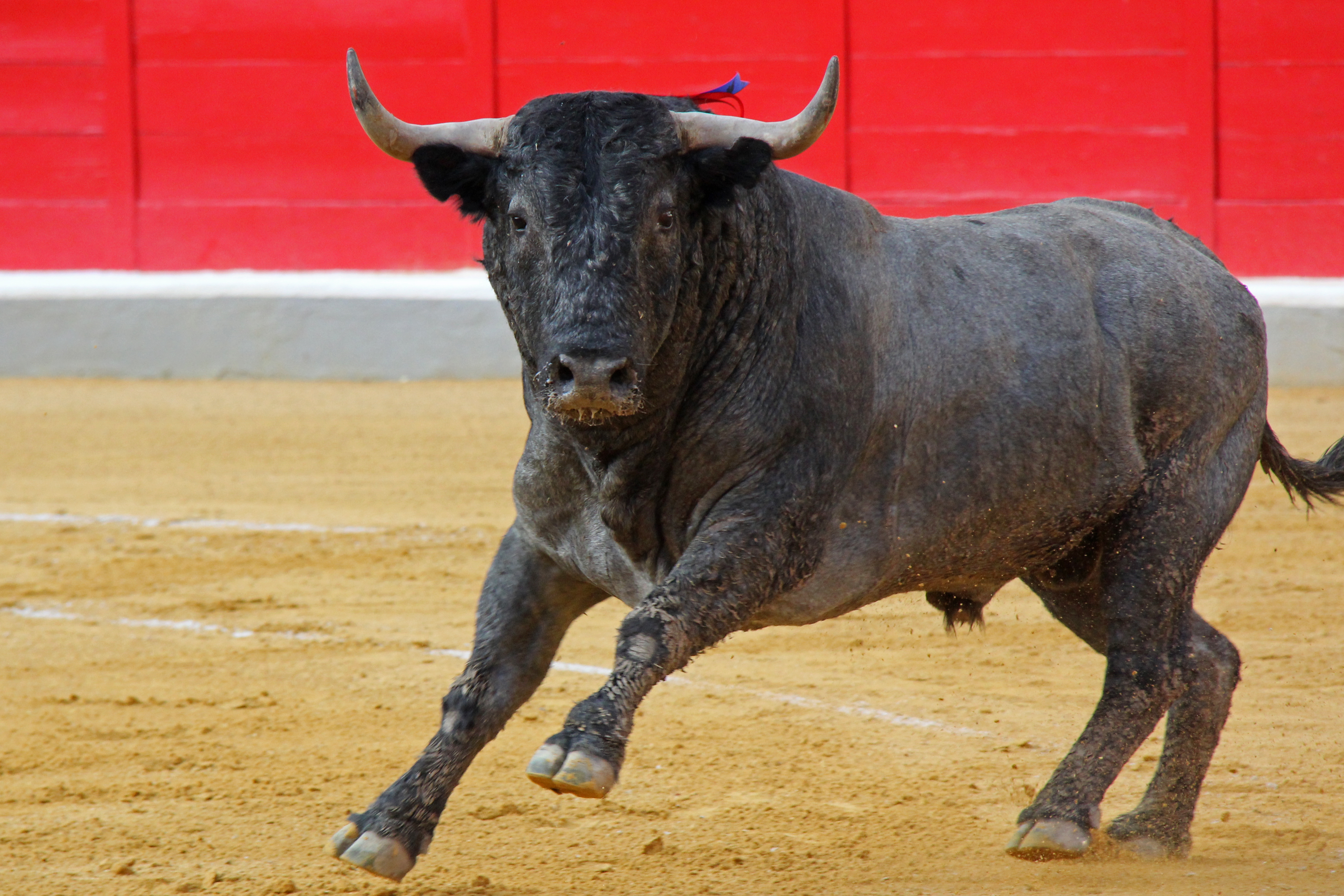 Toro de la ganadería española de Victorino Martín, lidiado en la Plaza de toros de Granada el 26 de junio de 2011